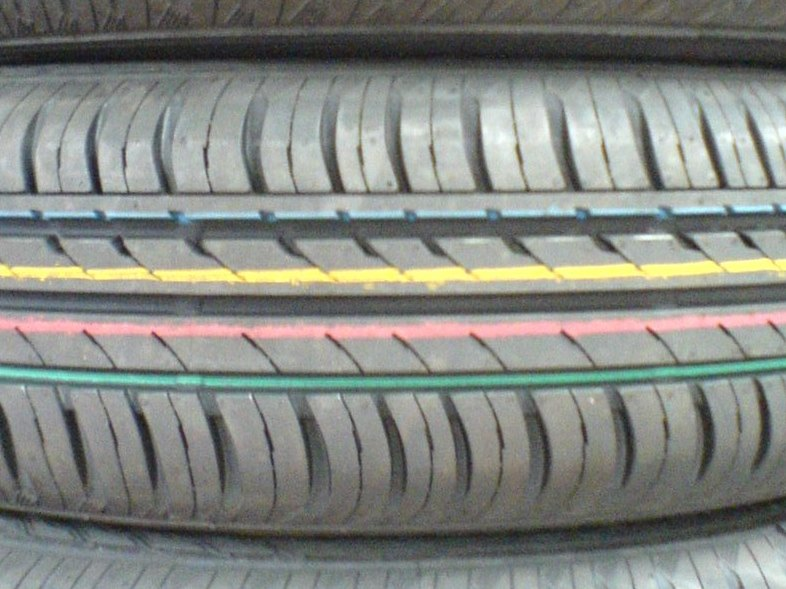 Gestapelte Autoreifen mit farbigen Markierungen